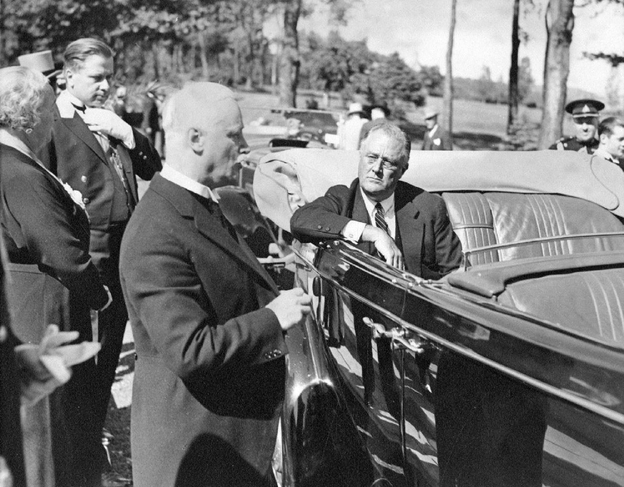 Ésioff-Léon Patenaude et Franklin D. Roosevelt lors d'un bref passage de celui-ci à la résidence du lieutenant-gouverneur au bois de Coulonge (Spencer Wood).